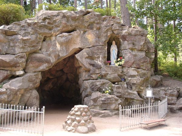 Birutė Hill, Palanga, Lithuania